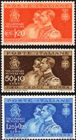 Serie di francobolli dedicati alle nozze del principe Umberto II